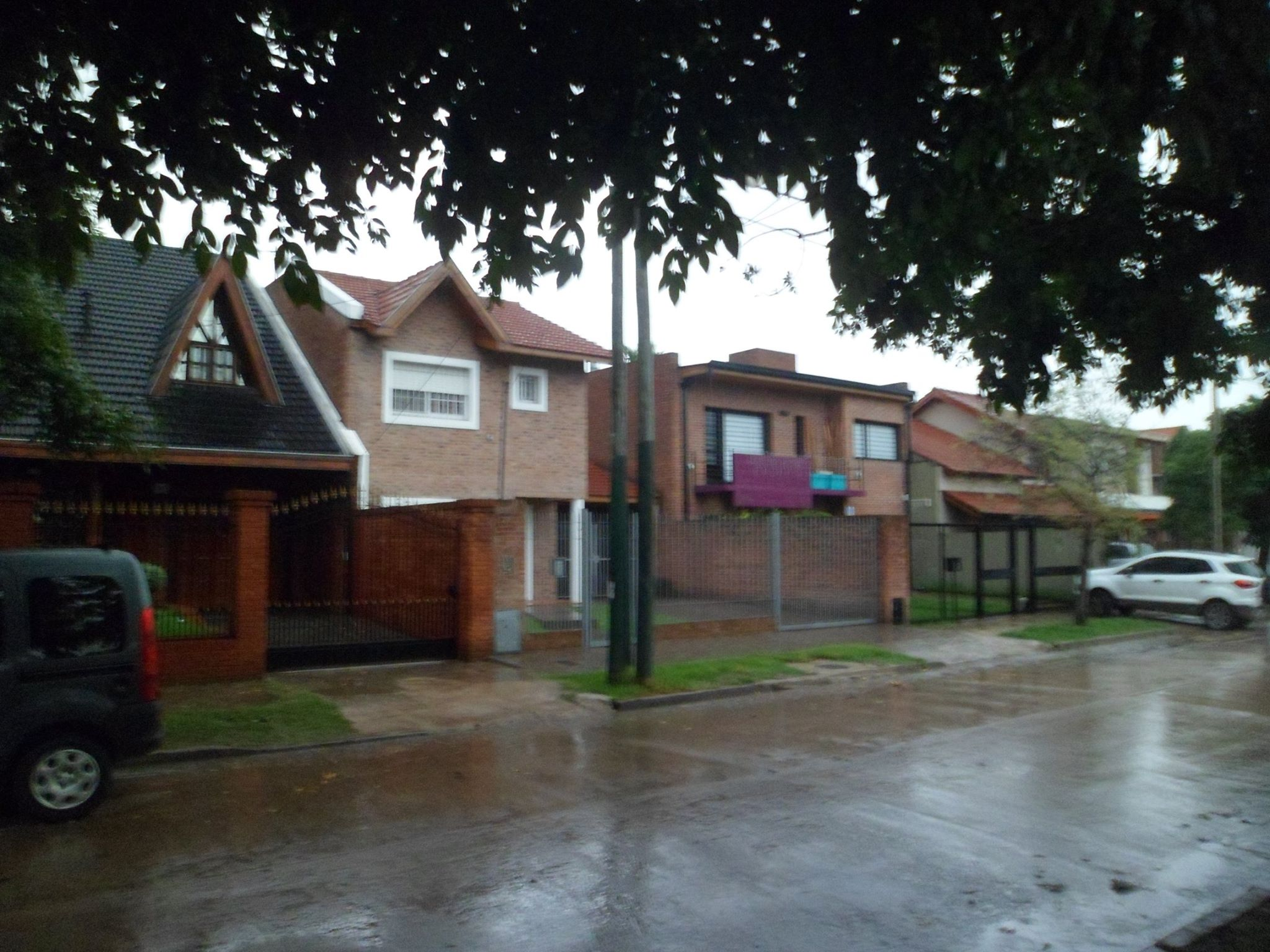 Chalés ubicados en calle del barrio La Perla, Temperley